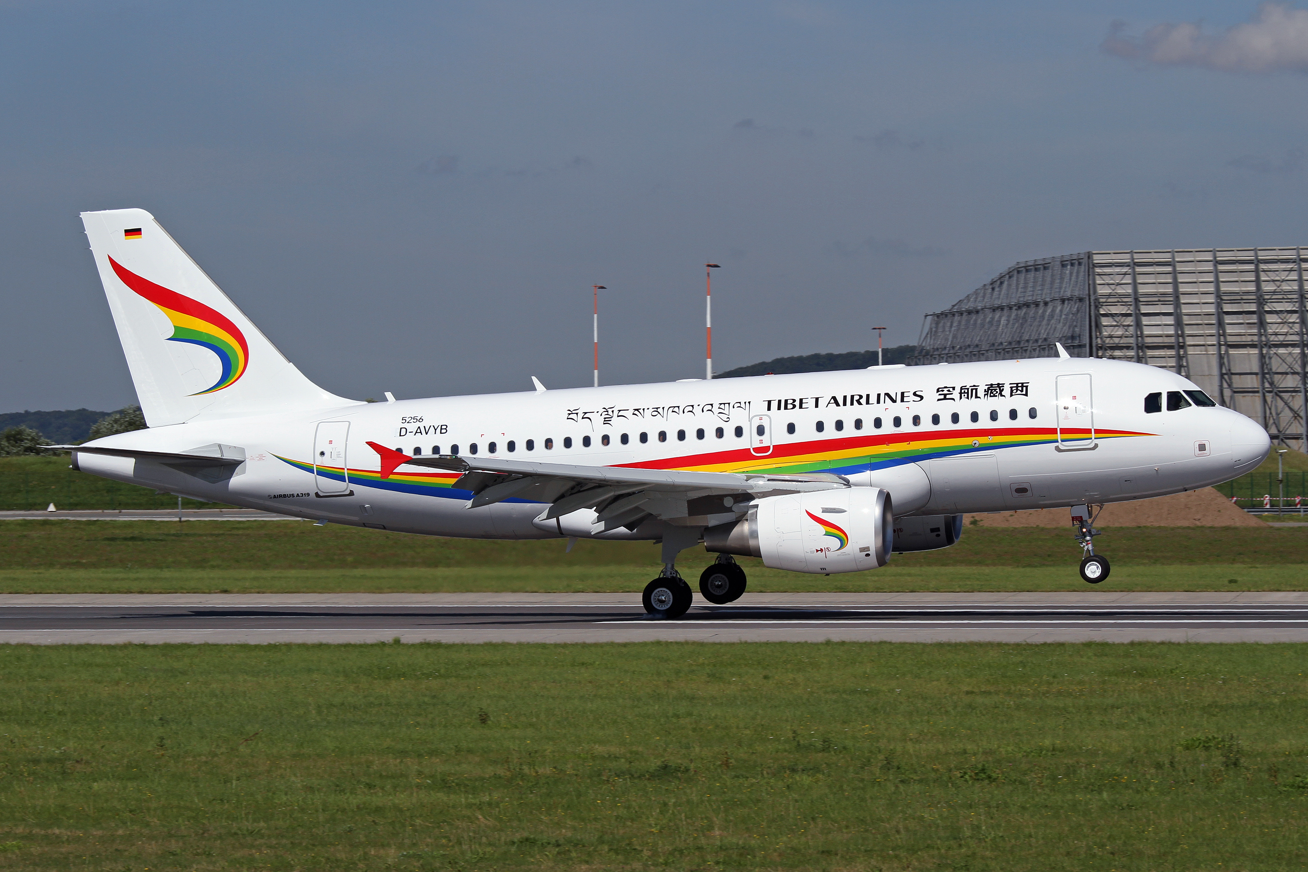 XFW 14-08-12 A319-112, Tibet Airlines, D-AVYB, B-6426 (MSN 5256)